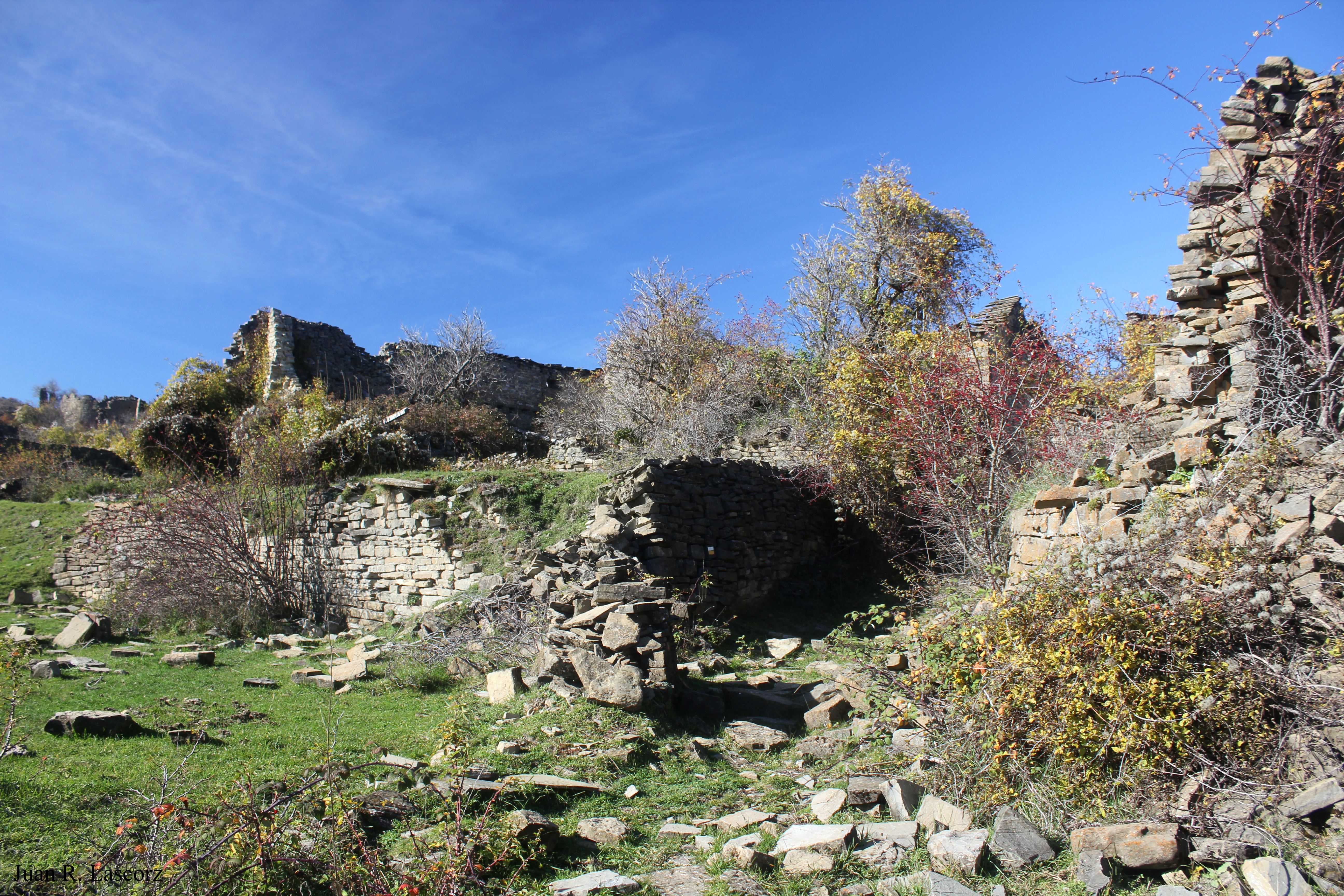 Aragonés: Enrunas en o nuclio deshabitau de Basarán (Sobrepuerto, Uesca).